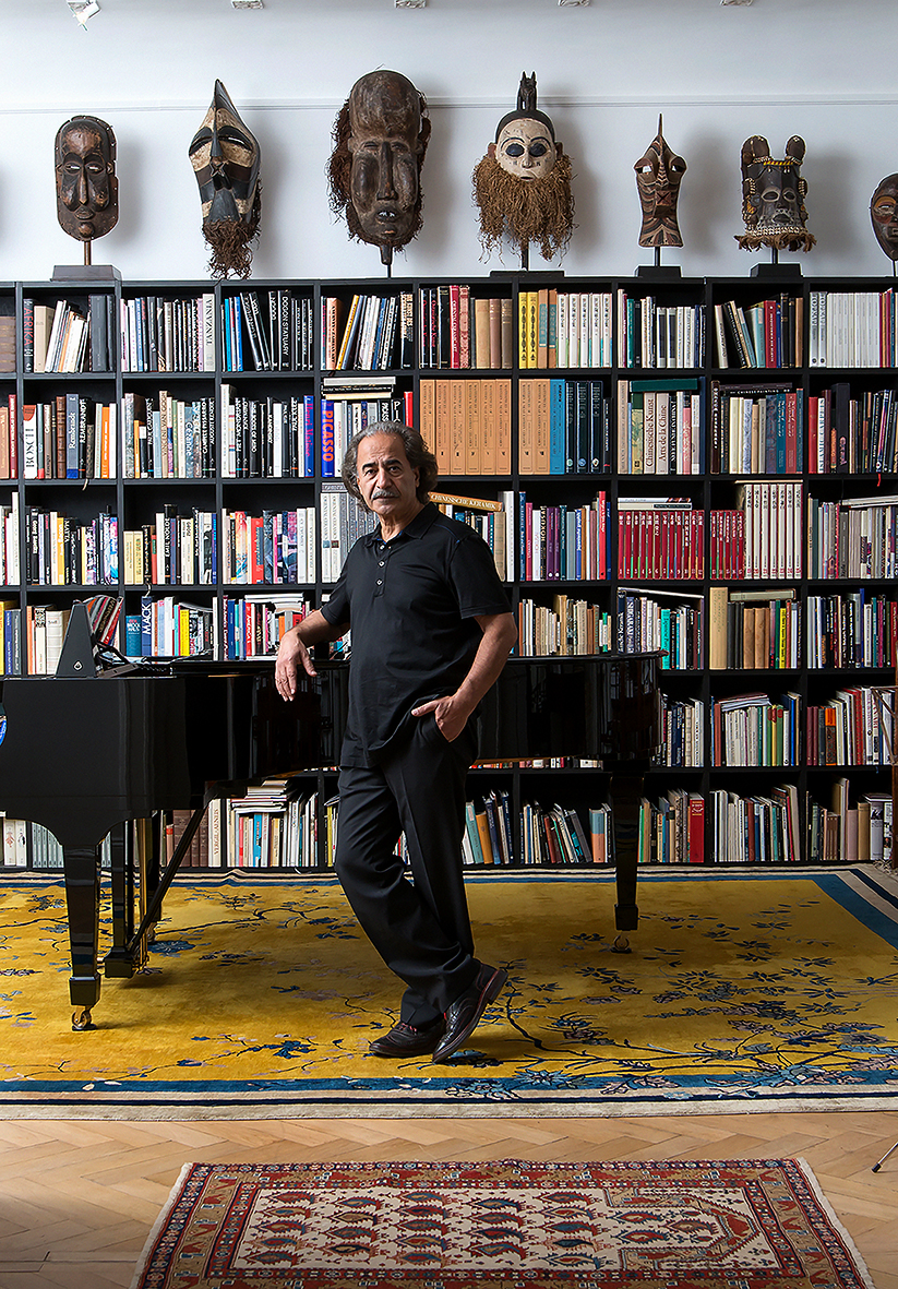 Portrait